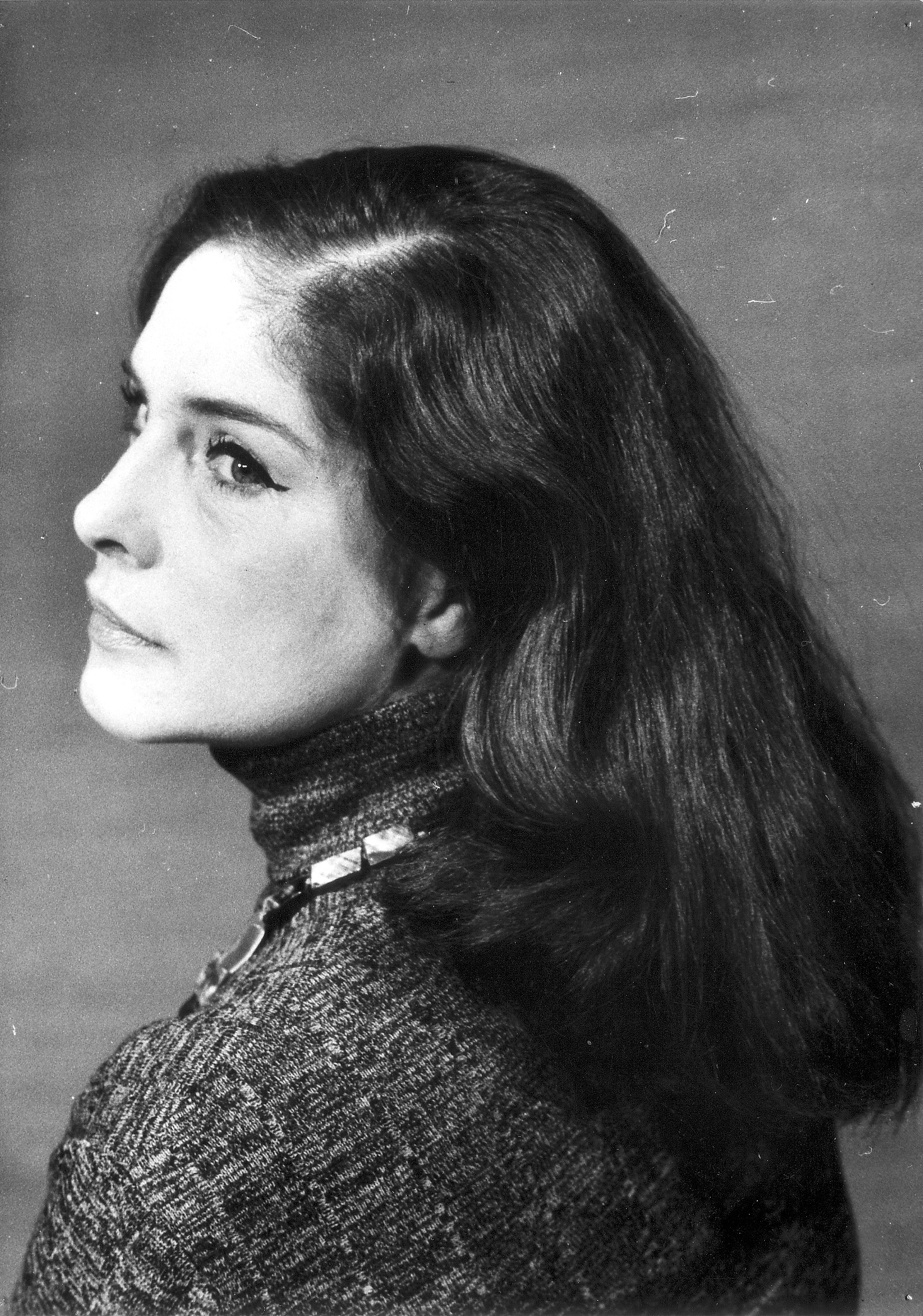 Herečka Vlasta Fialová, nedatováno. Archiv Národního divadla Brno.